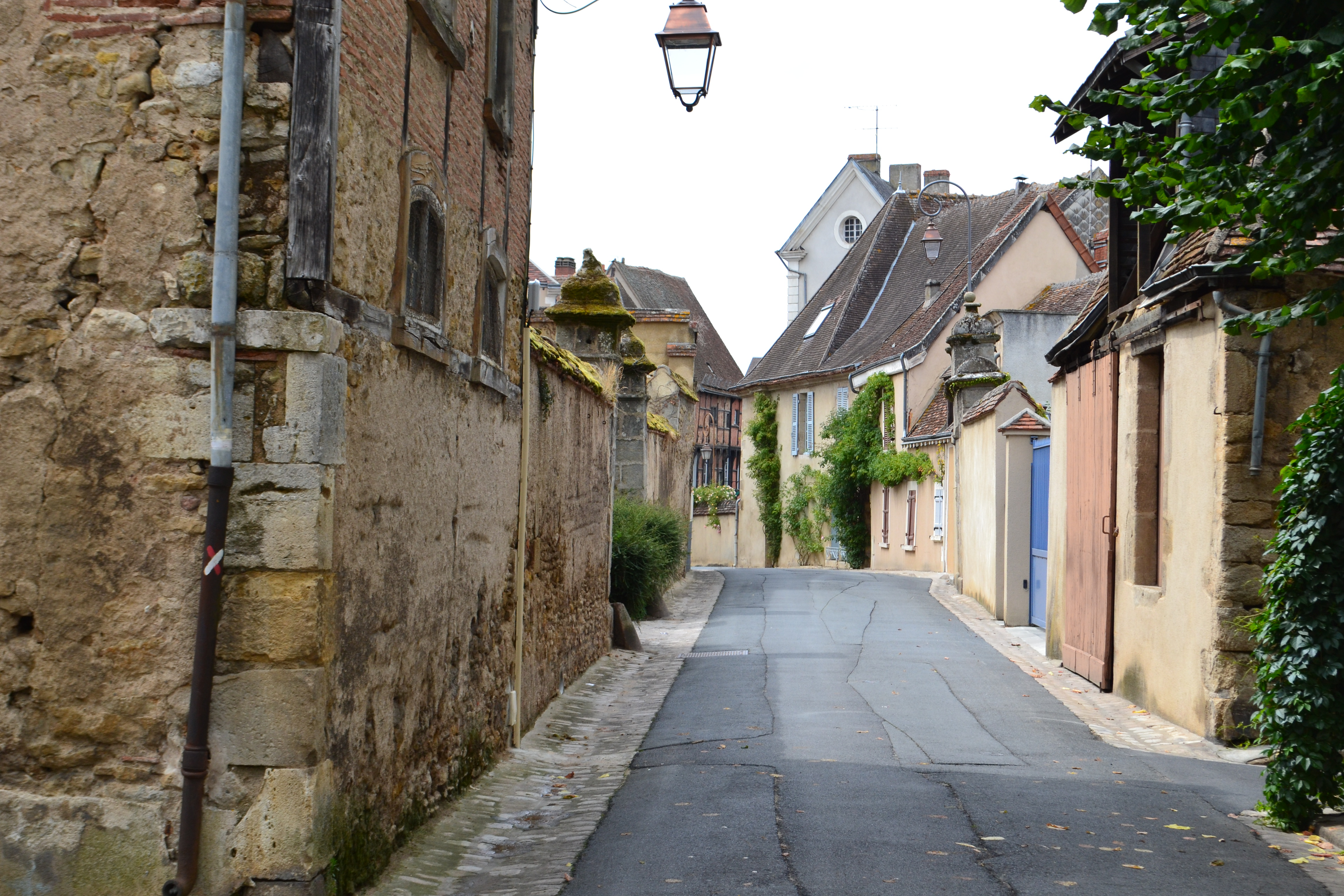 Rue de La Châtre (Indre).